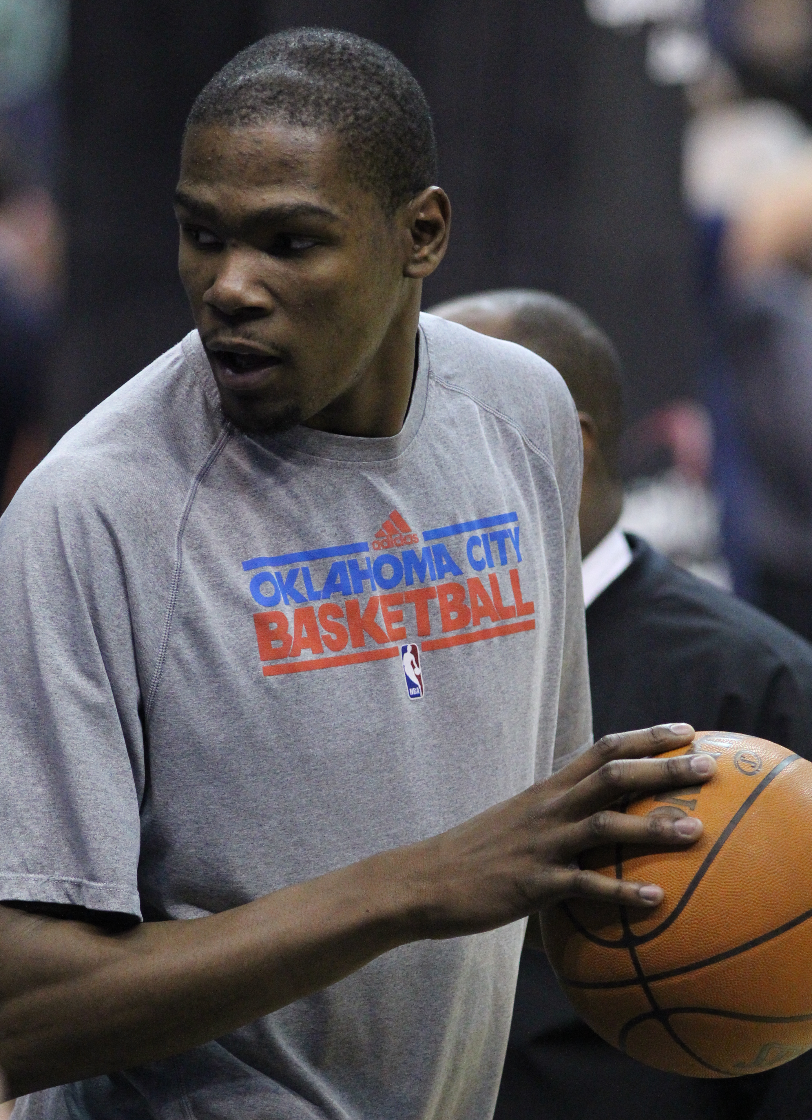 Wizards v/s Thunder 03/14/11